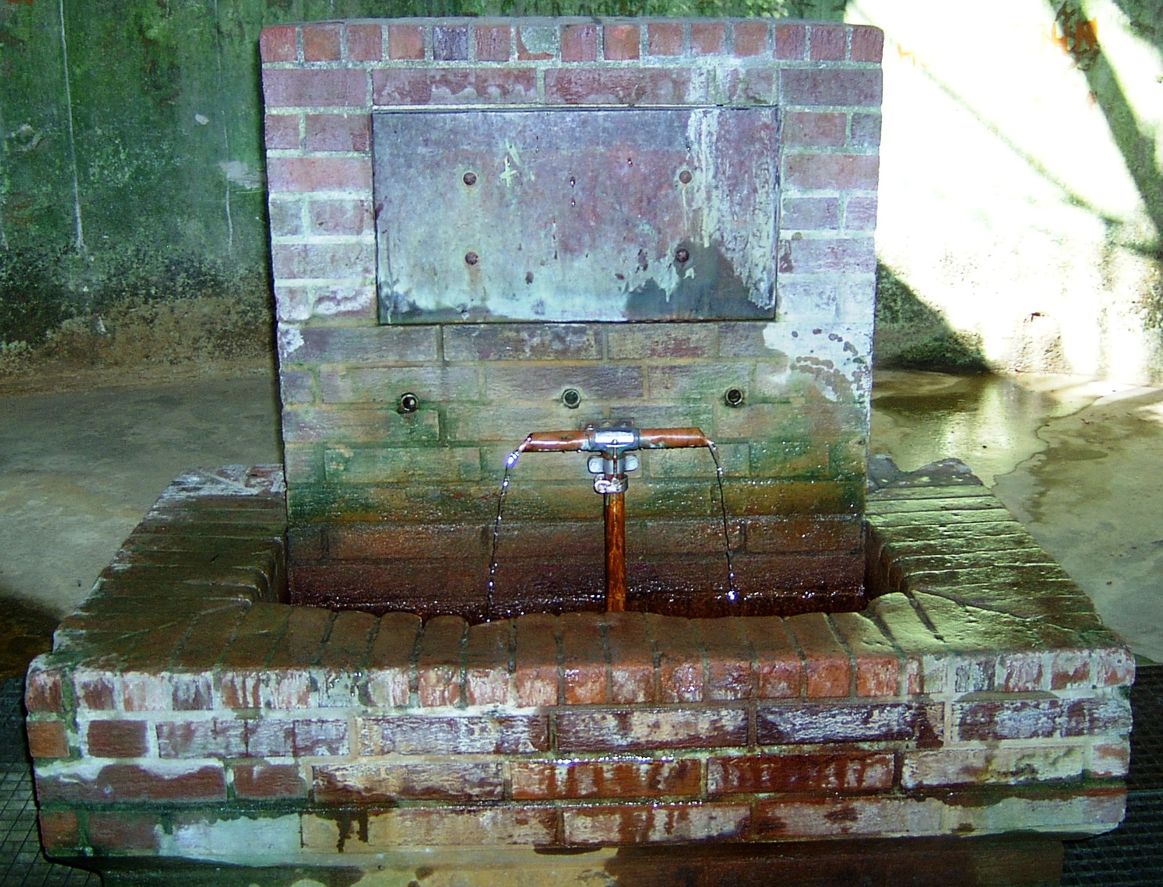 Lindenholzhausen, Germany, Sauerbrunnen, front